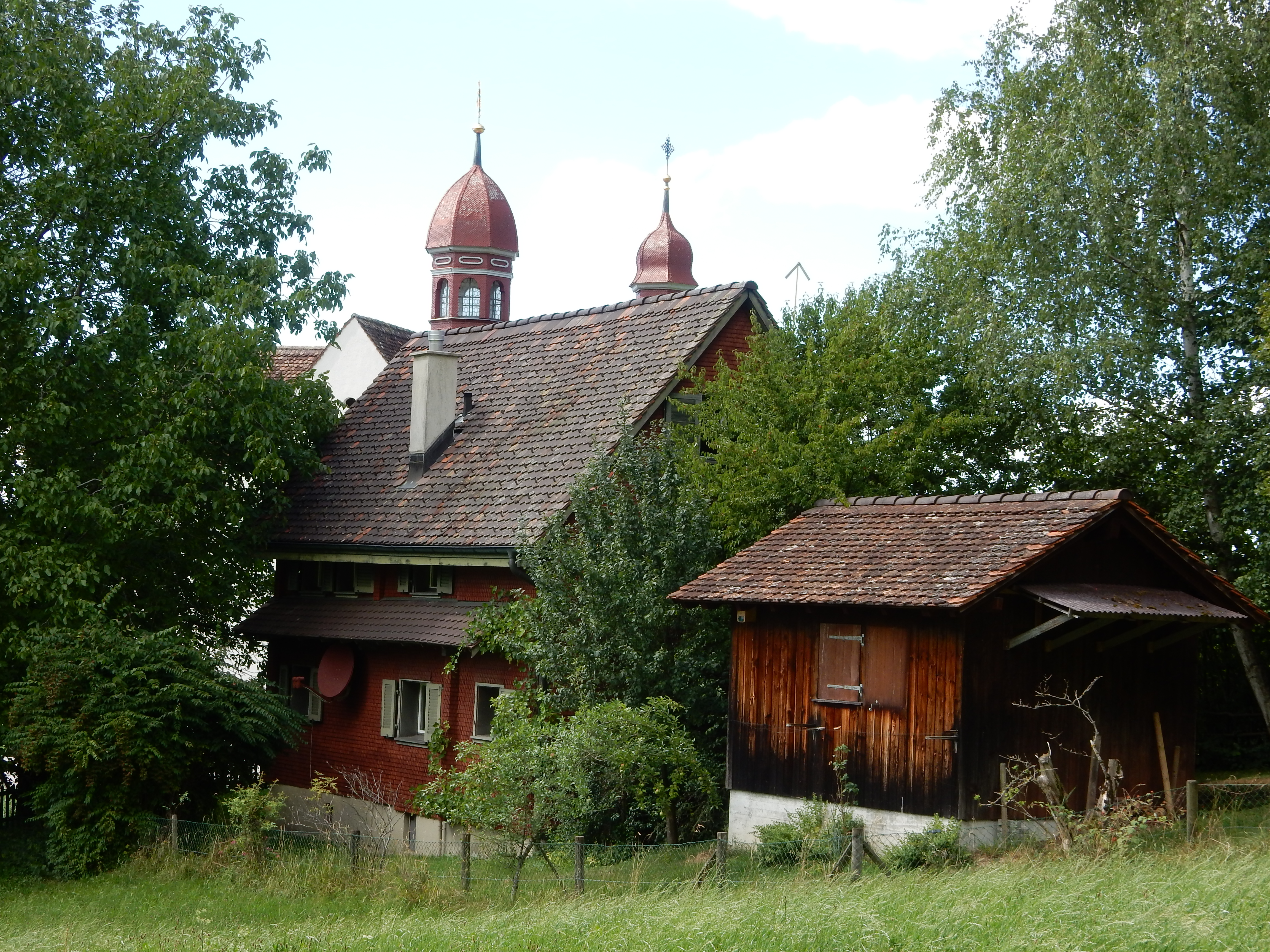 Zoug, Sainte-Vérène, ermitage et chapelle